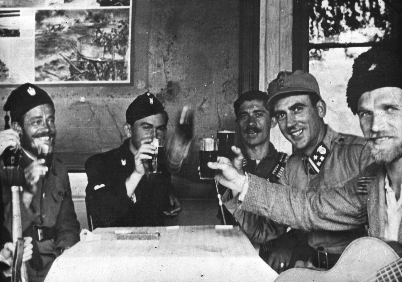 Srpskohrvatski / српскохрватски: Četnici, domobrani i ustaše zajedno piju. Levo, sa šubarom, Uroš Drenović.